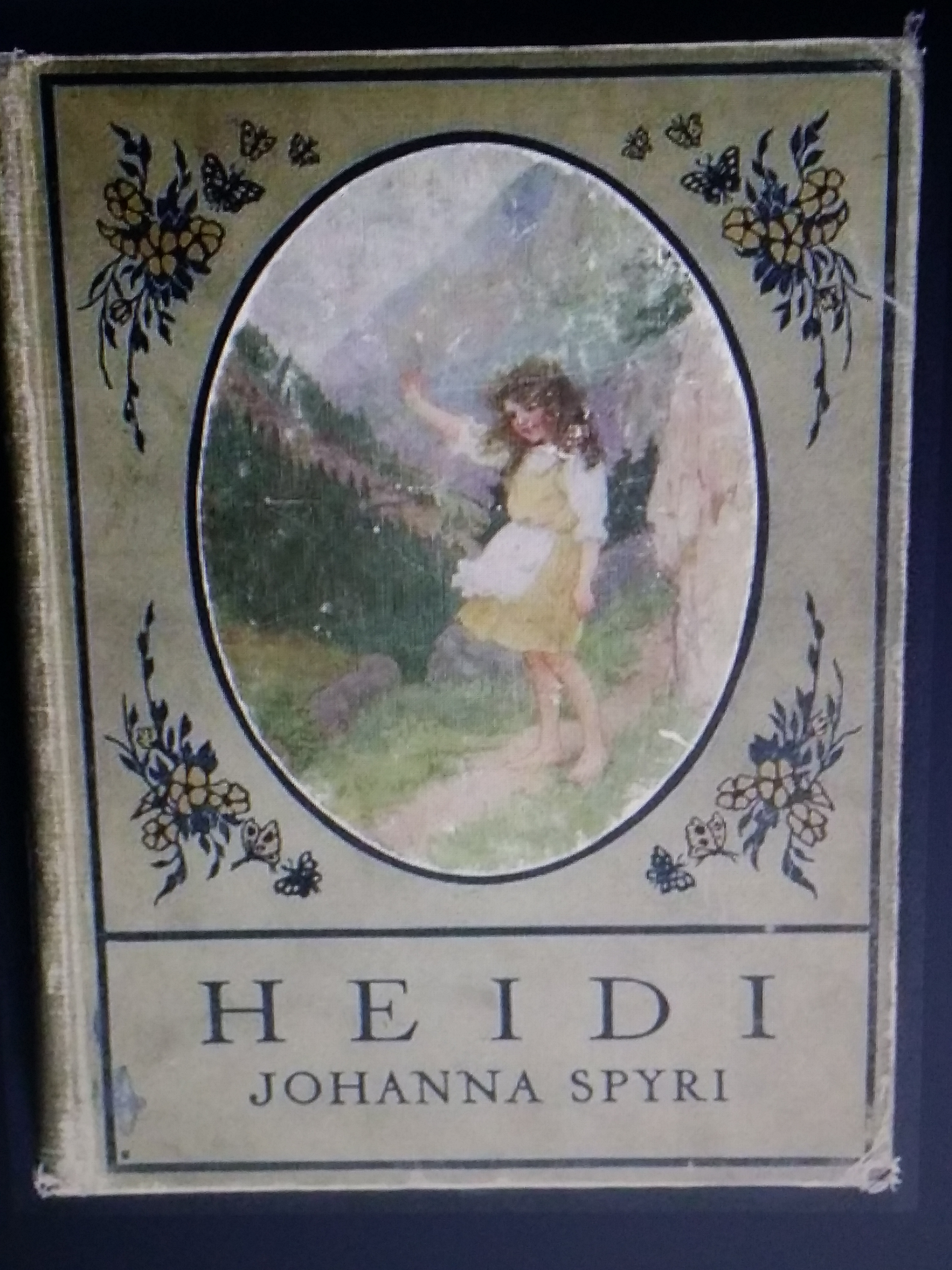 Heidi (naslovnica)